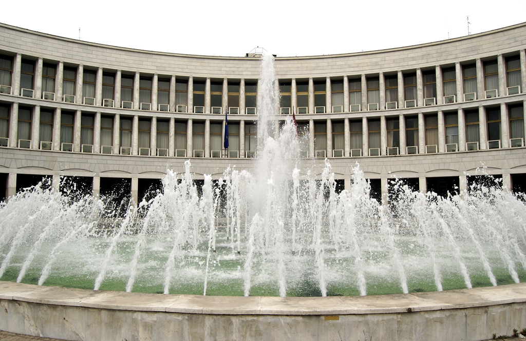 Roma, palazzo dell'INPS all'EUR